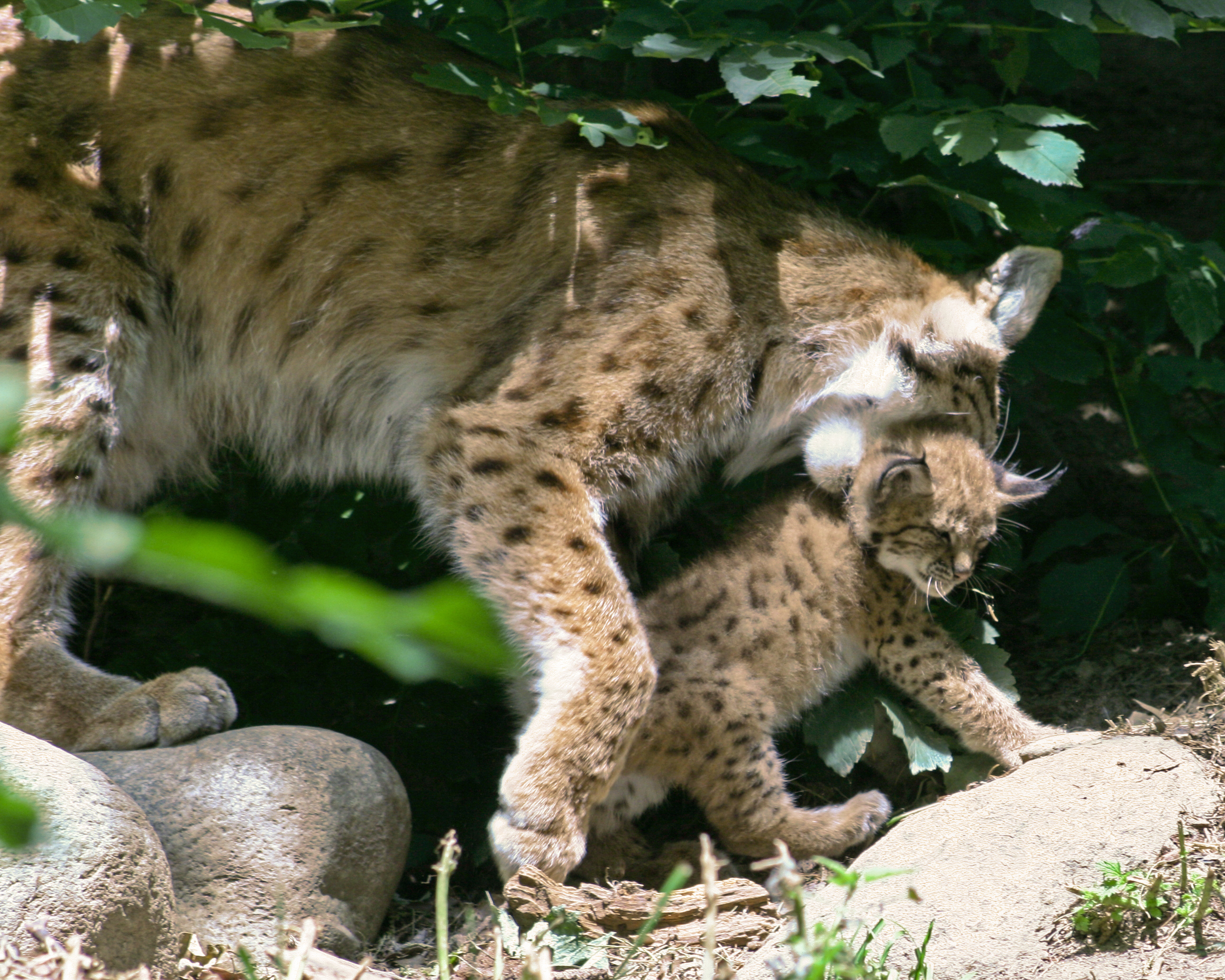 Luchsbaby wird von Mutter getragen